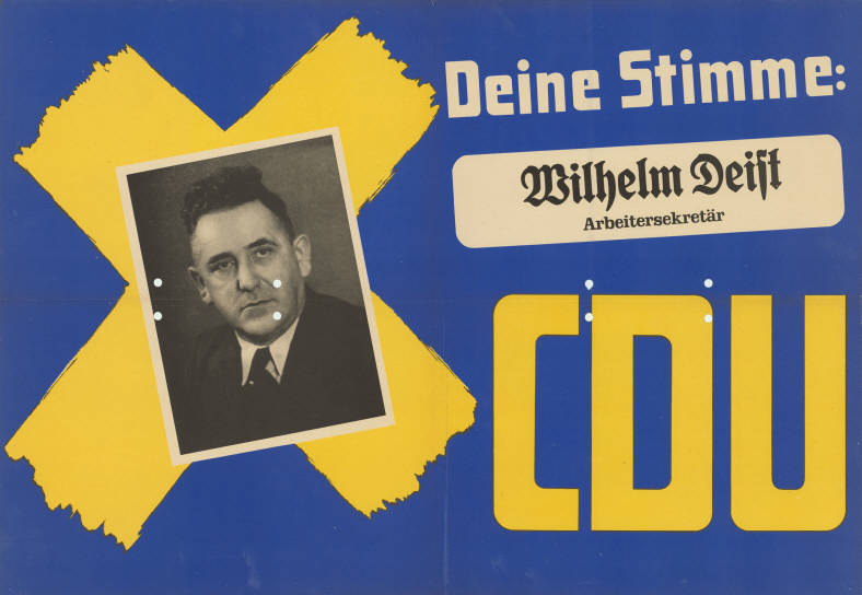 Deine Stimme: Wilhelm Deist Arbeitersekretär CDU Abbildung: Porträtfoto - Stimmkreuz Plakatart: Kandidaten-/Personenplakat mit Porträt Objekt-Signatur: 10-009 : 150 Bestand: Landtagswahlplakate Nordrhein-Westfalen (10-009) GliederungBestand10-18: Landtagswahlplakate Nordrhein-Westfalen (10-009) » Landtagswahl am 18.6.1950 » CDU » mit Porträtfoto Lizenz: KAS/ACDP 10-009 : 150 CC-BY-SA 3.0 DE